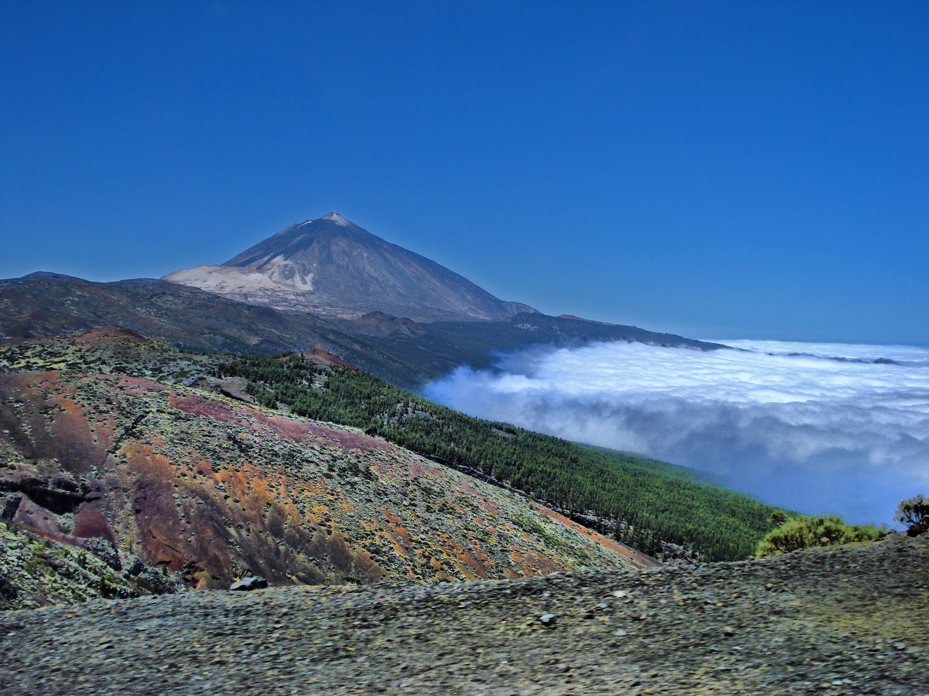 Teneriffa, Vulkan "Teide"